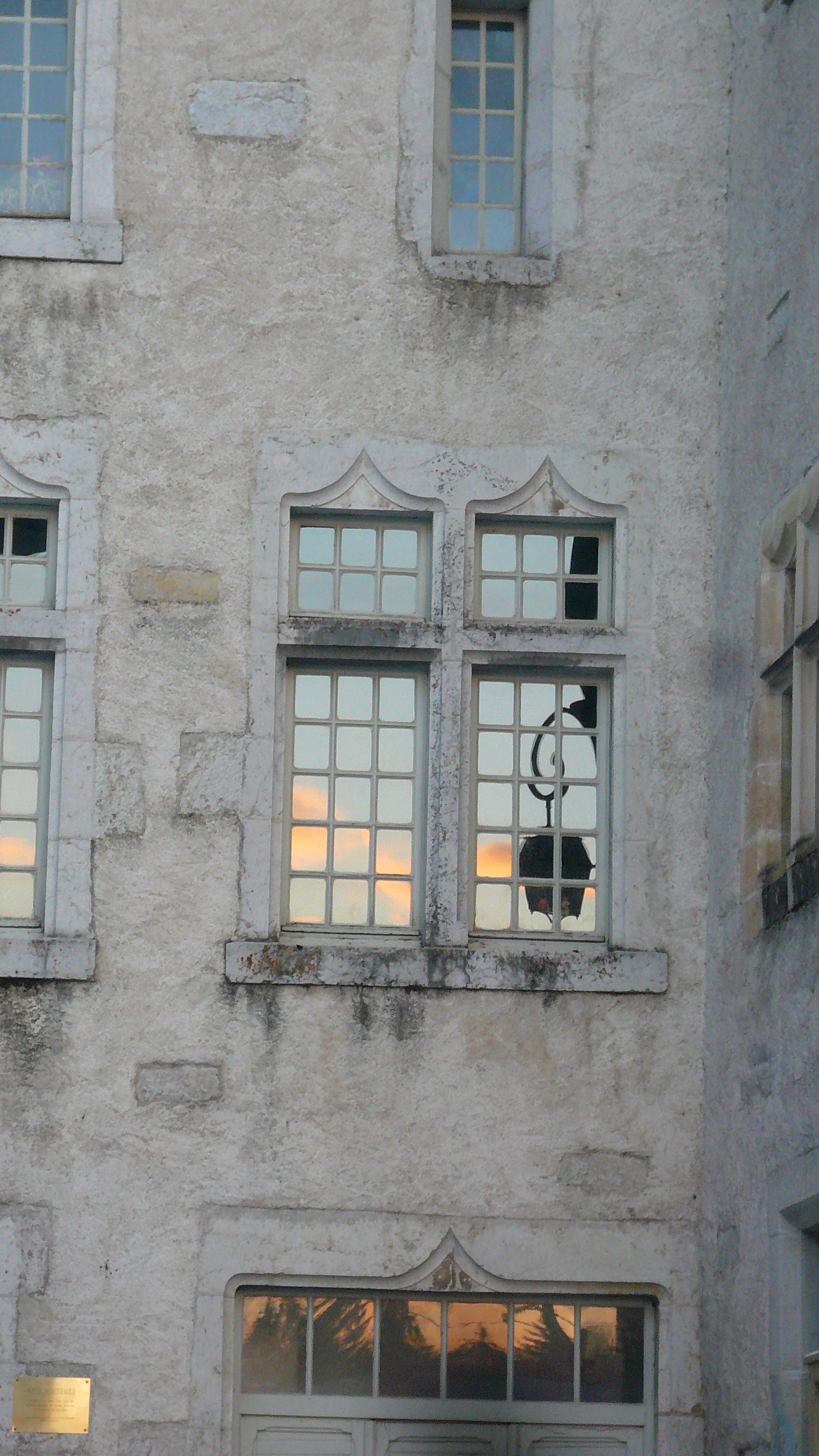 Montbenoît. L'Abbaye. Les fenêtres de la façade ouest. La nef de l'église date du 12e siècle, le choeur du 16e et le clocher a été refait en 1903.